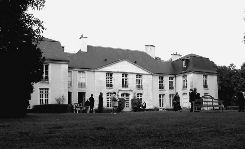 Façade du Chateau de Blosset de style globalement 18e siècle